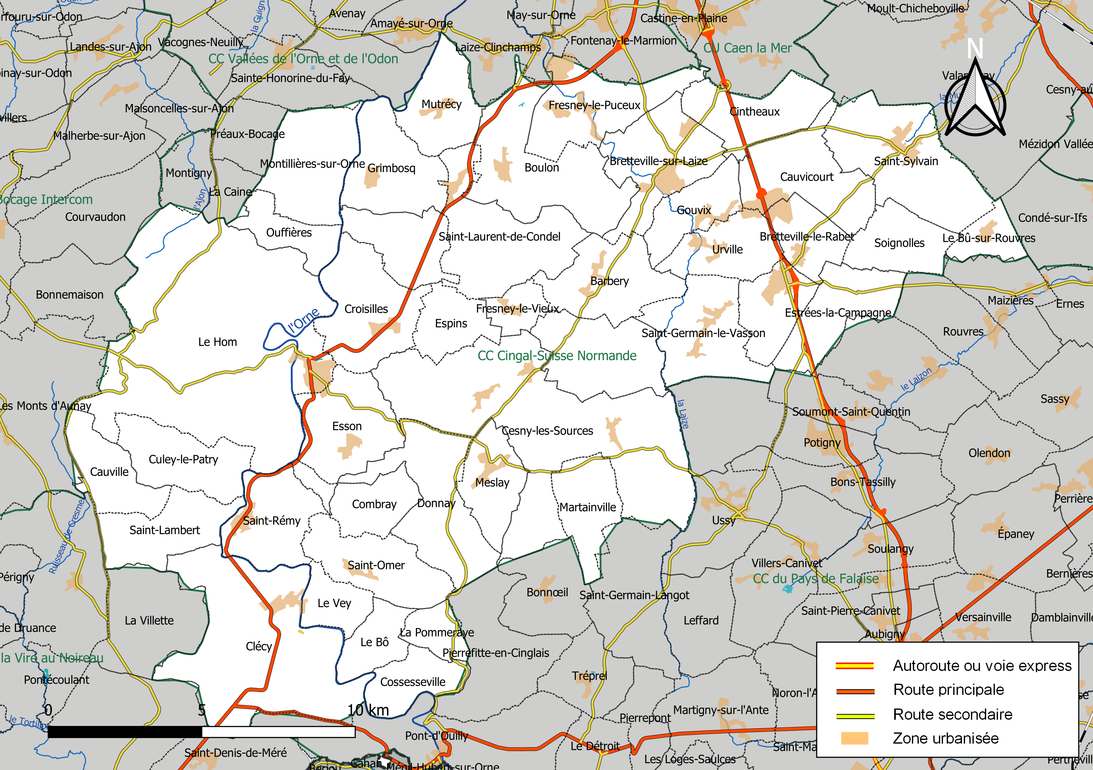 Carte géographique de la Communauté de communes Cingal-Suisse Normande, département du Calvados, France. Composition au 1er janvier 2019.